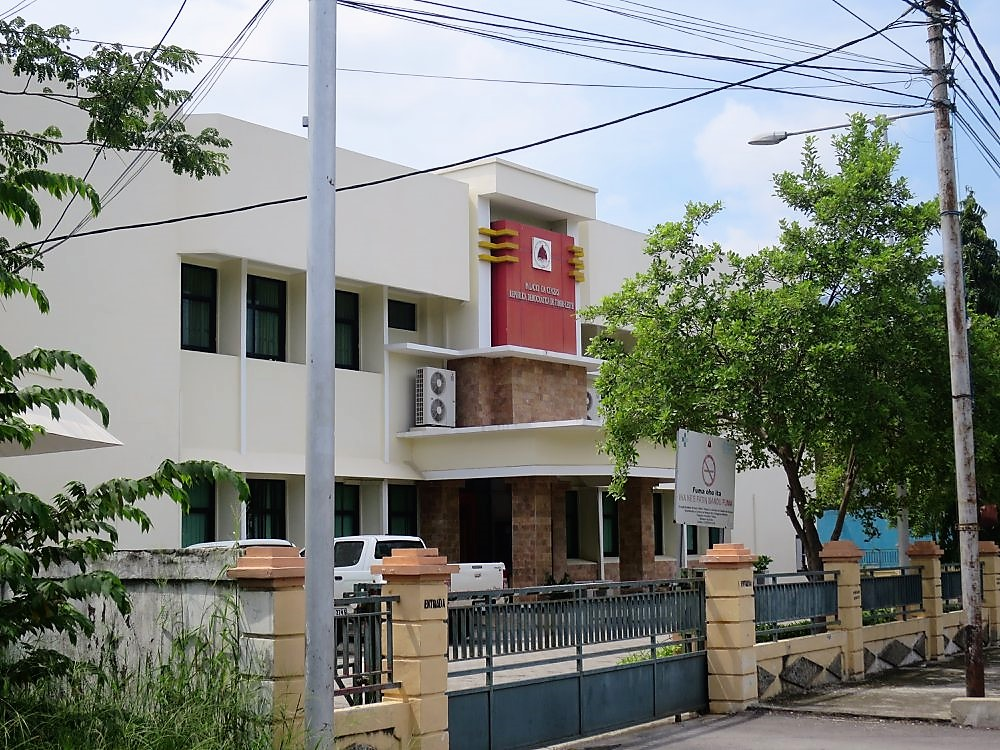 Palácio das Cinzas, Gesundheitsministerium und ehemaliger Präsidentensitz